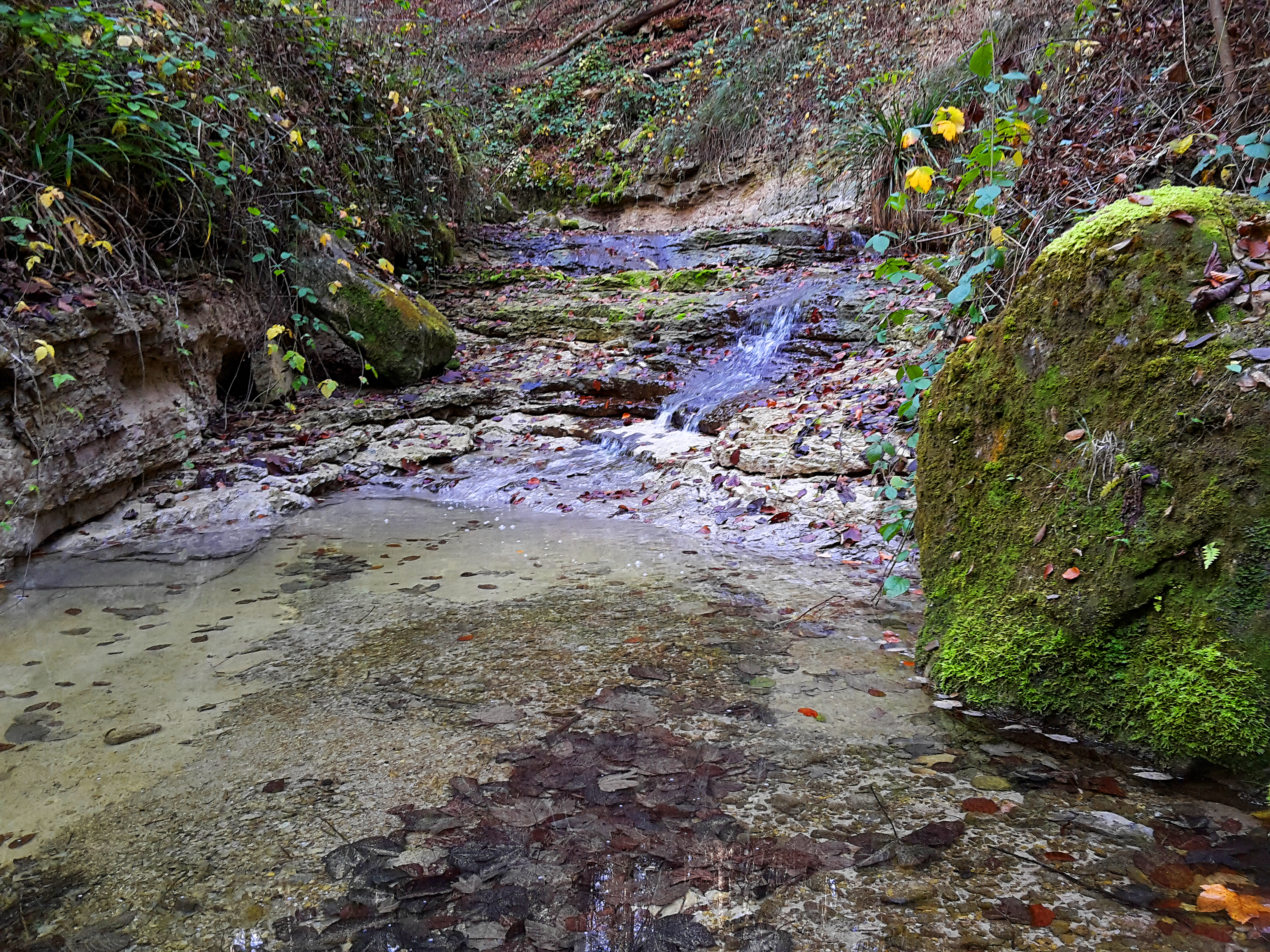 Dorfbach im Bachtobel in der Gemeinde Maur ZH, Schweiz